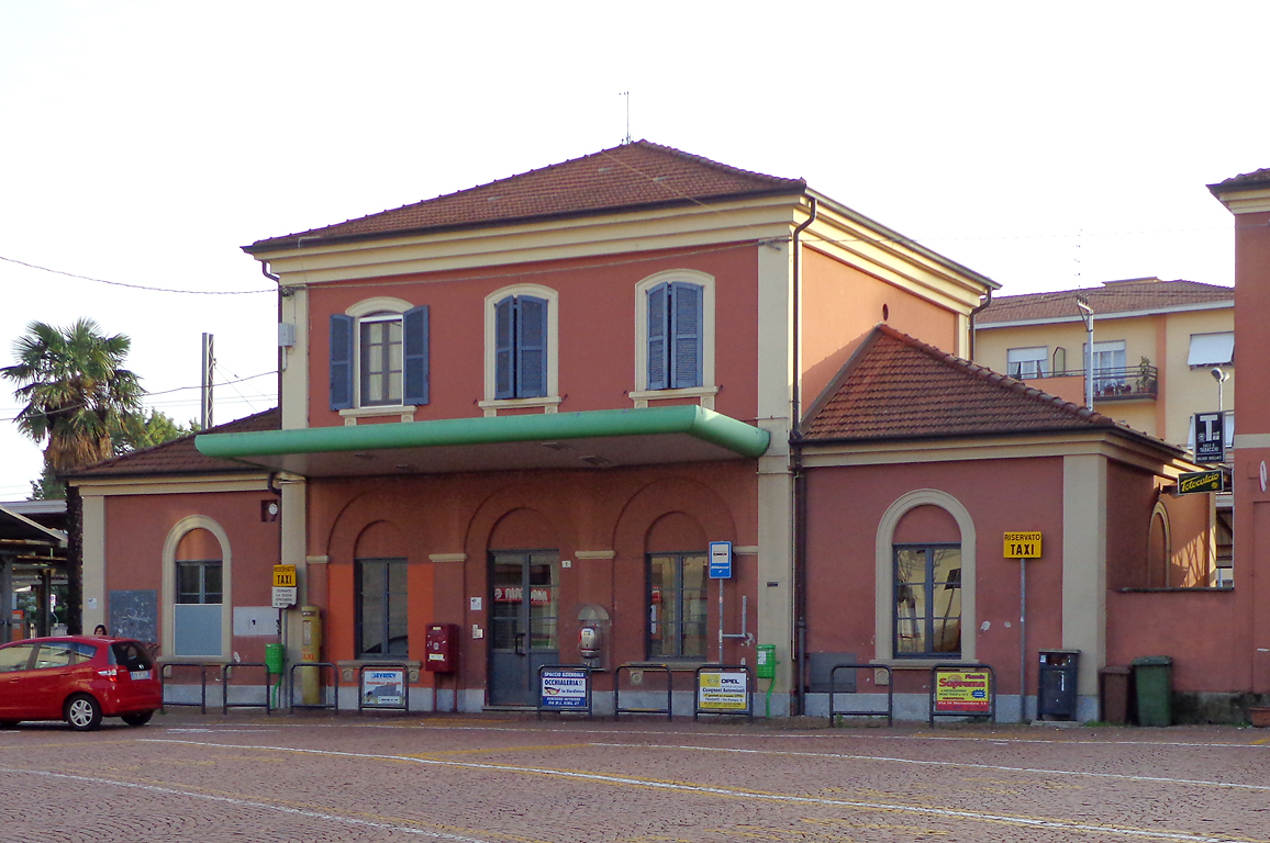 Stazione ferroviaria di Tradate